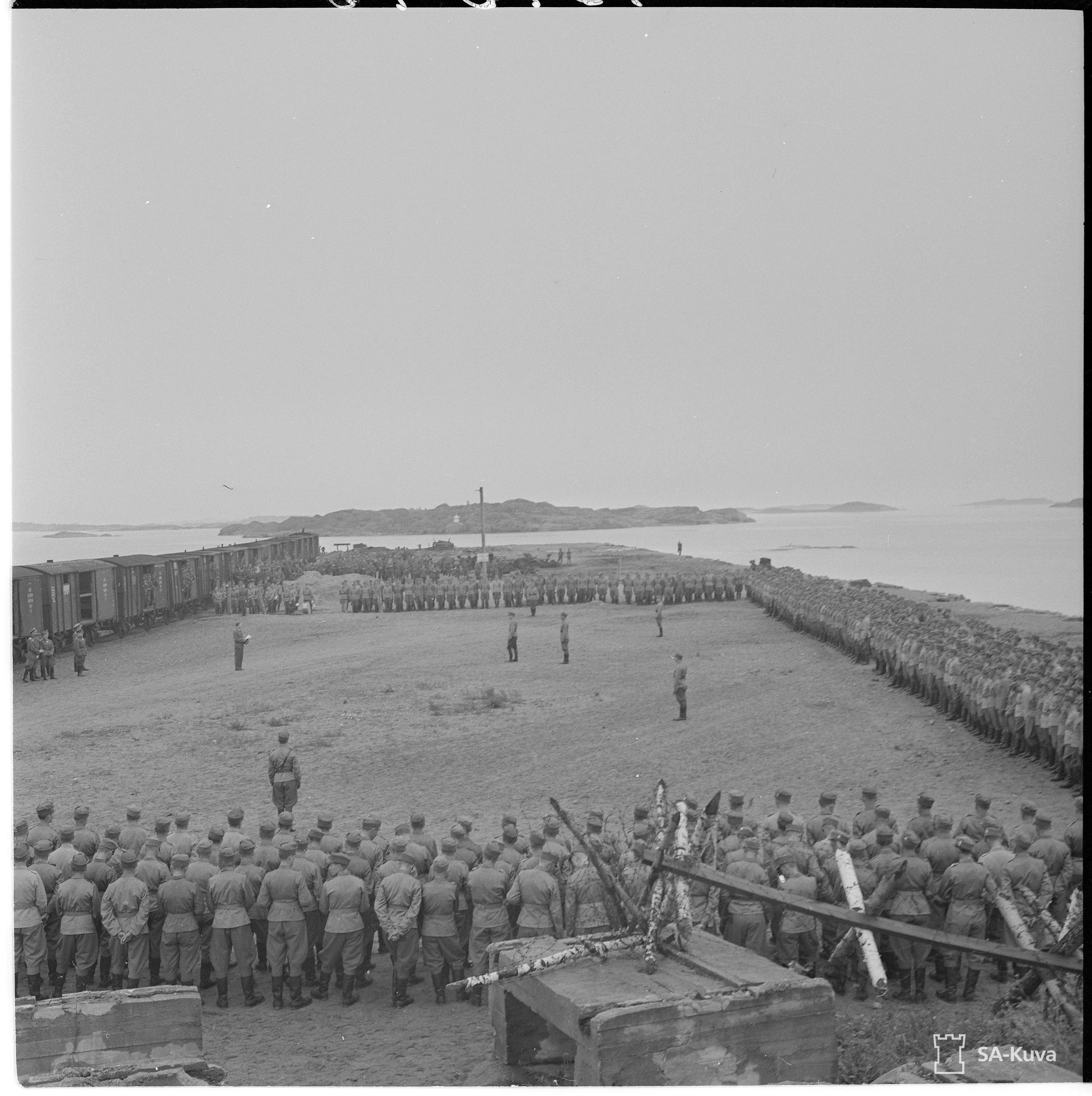 Suomalaisia SS-miehiä suomalaisissa sotilaspuvuissa lähtöparaatissa 11.7.1943